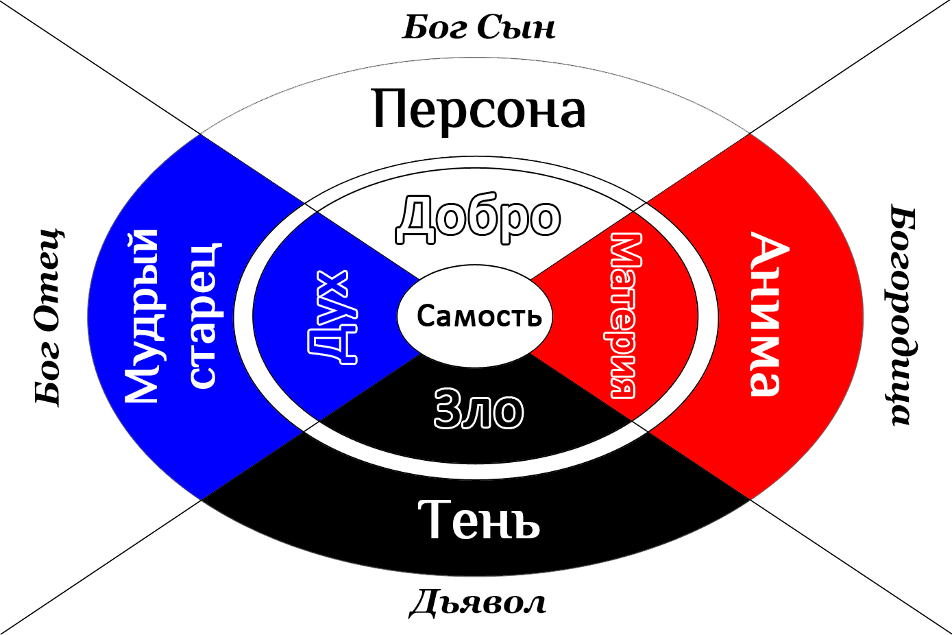 Схема архетипа четверицы на примере мужчины. Включает архетипы персона, тень, анима, мудрый старец и самость. Последний объединяет 4 предыдущих по принципу мандалы. Четверица имеет соответствия в виде символов Бога Отца, Бога Сына, Богоматери и дьявола. Рисунок основан на книгах К. Г. Юнга «Эон», «Ответ Иову», «Человек и его символы».